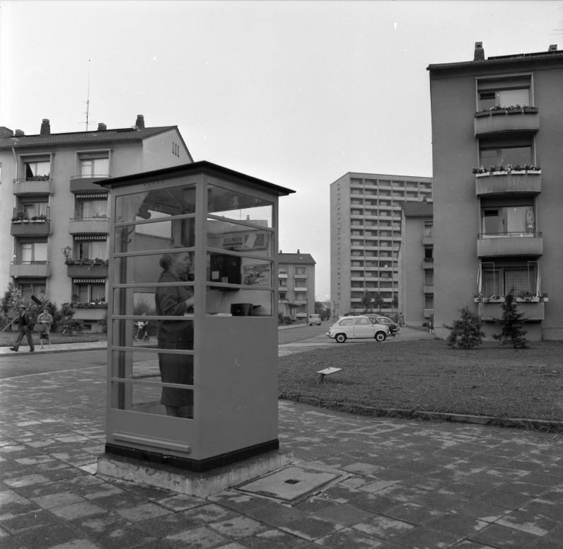 Wohnungsbau: Frankfurt/Main, Albert Schweitzer-Siedlung 17.-20.7.1961